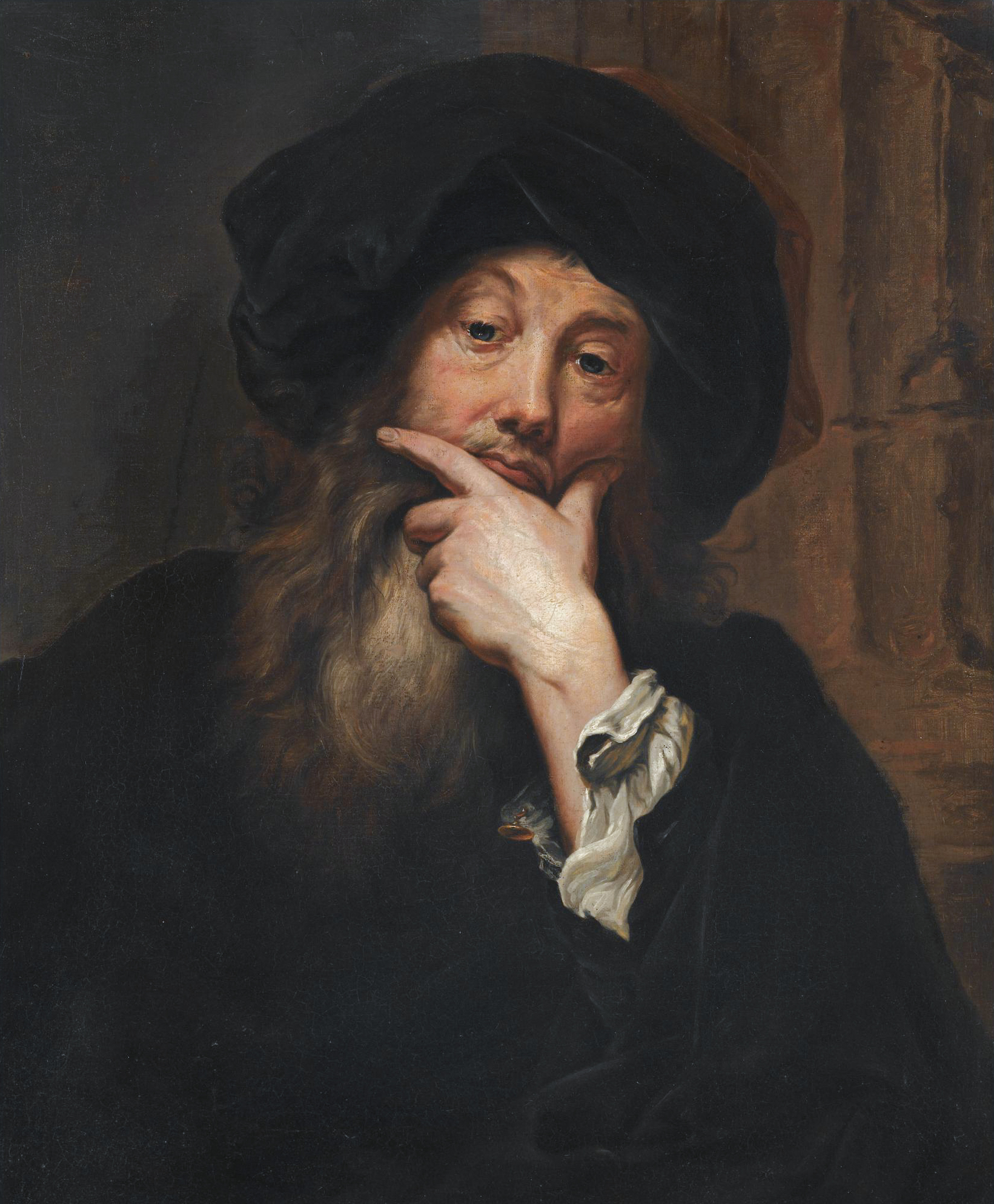 Self-portrait